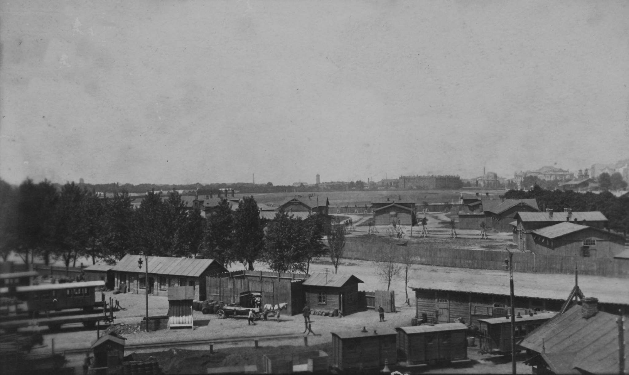 Беларуская (тарашкевіца): Менск (Miensk), Кальварыя (Kalvaryja)